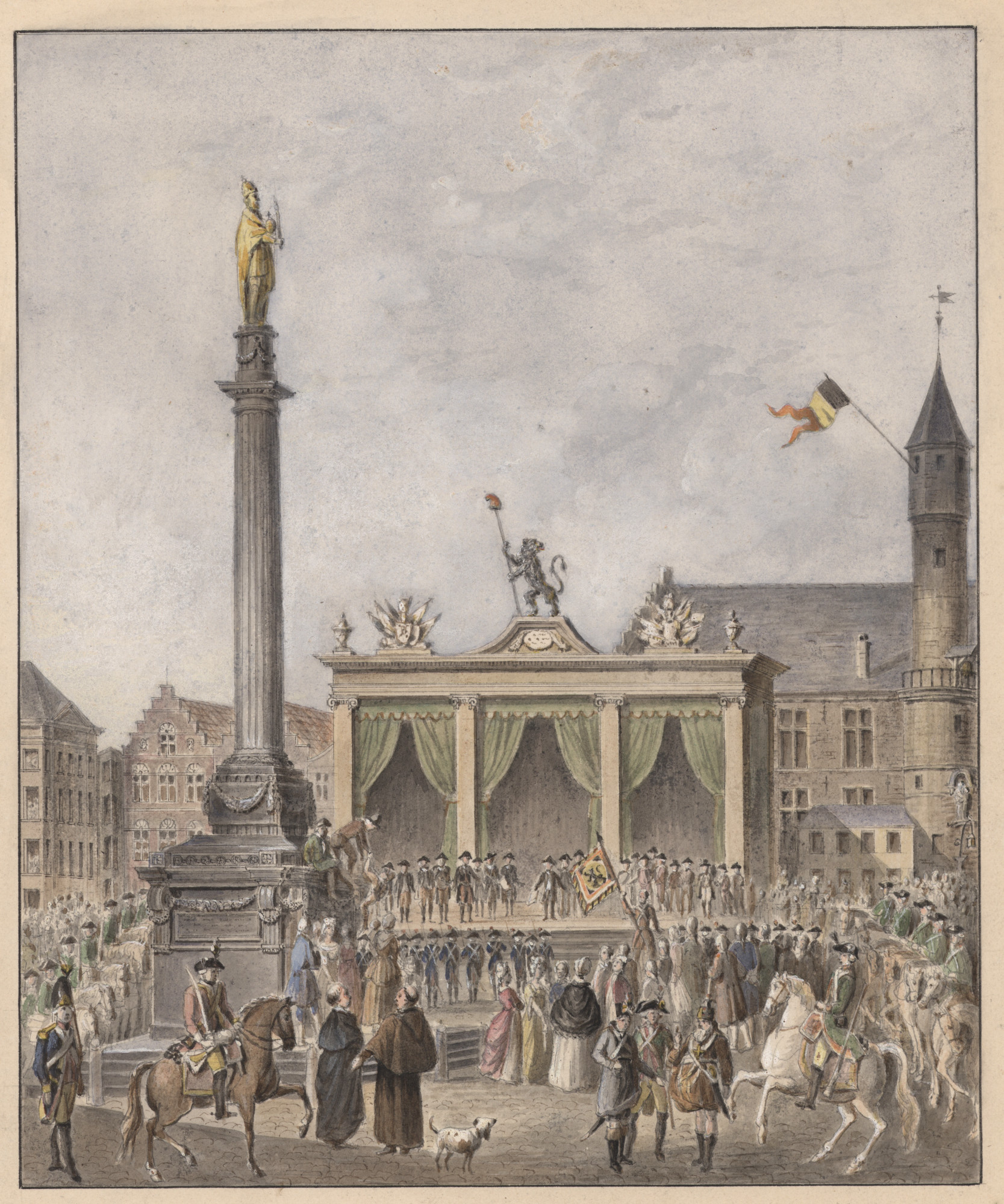 Gezicht op de Vrijdagmarkt en het theater, opgericht ter gelegenheid van de onthuldiging van Jozef II. Dit gebeurde met de deelname van de stadsmagistratuur, de vier hoofdgilden, en een grote volkstoeloop. De trofeën en vrijheidsemblemen werden geschilderd door Pieter Norbert Van Reysschoot. Verklarende tekst van P.J. Goetghebuer achter de prent